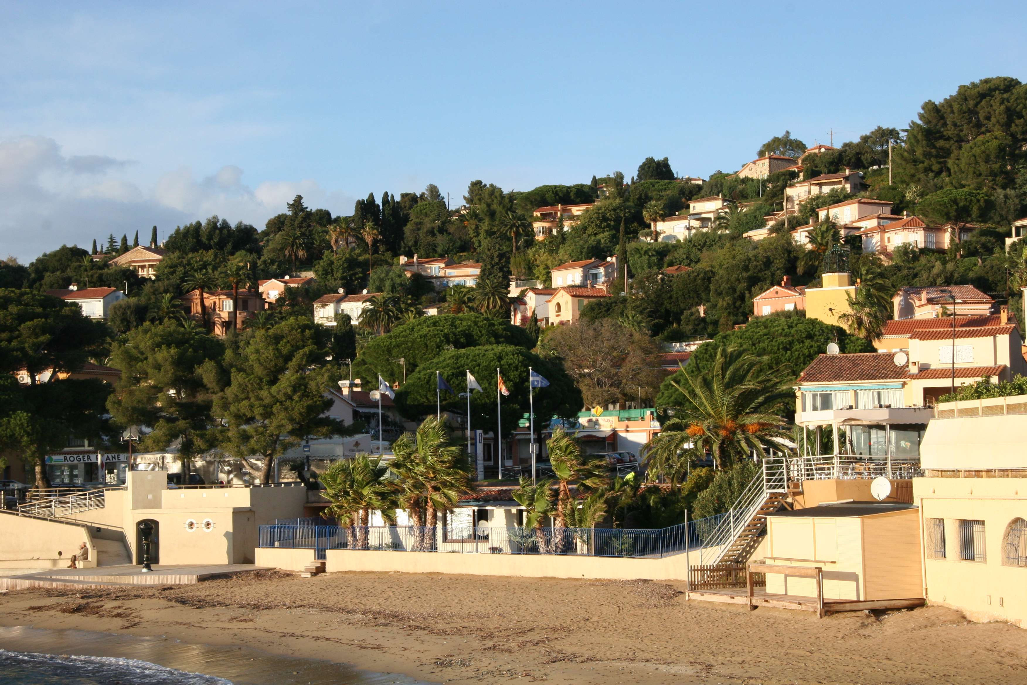 Village des Issambres (Var), en décembre 2009. Au premier plan : plage de San Peïre.